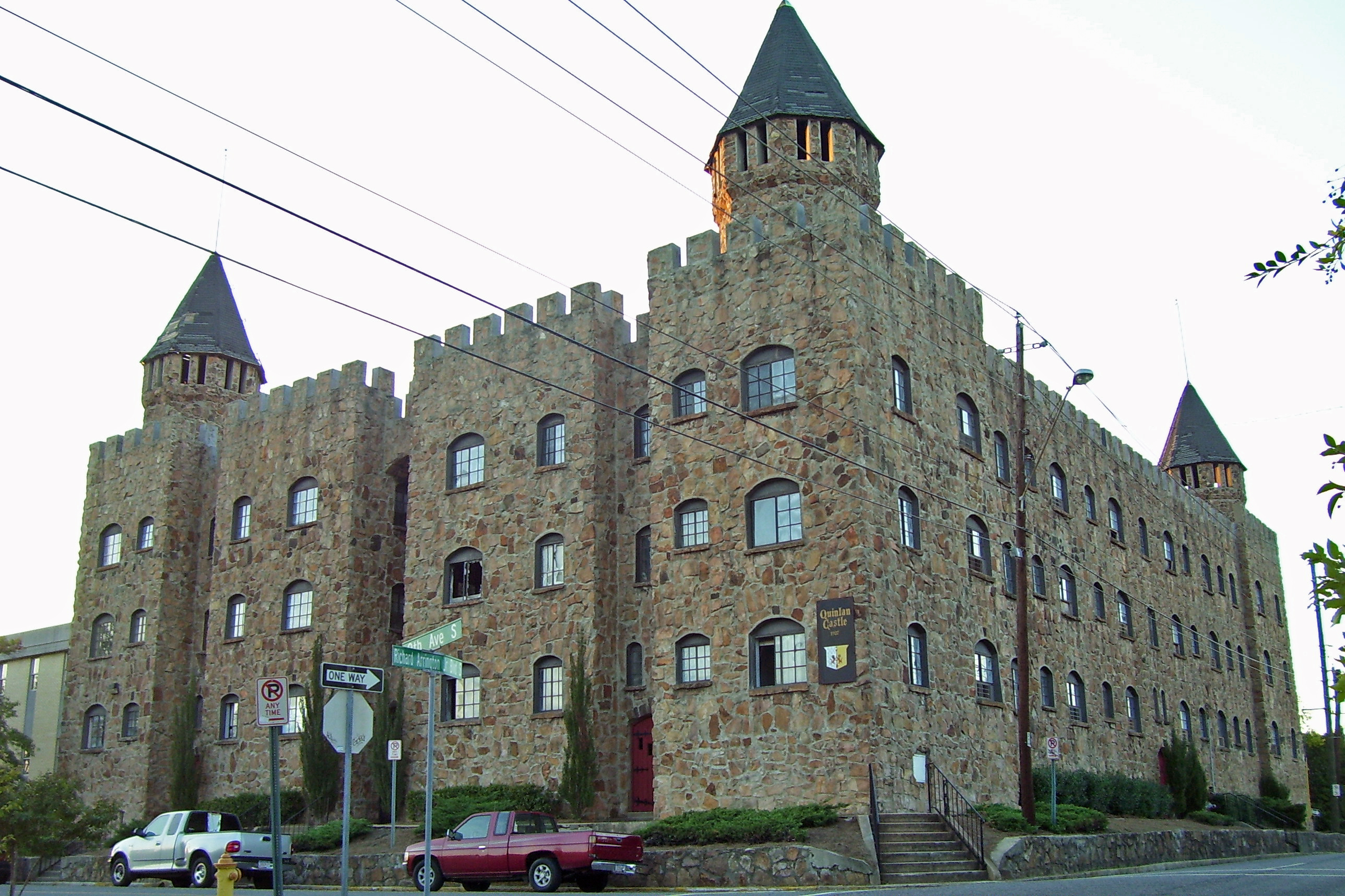 Quinlan Castle, Birmingham, Alabama.